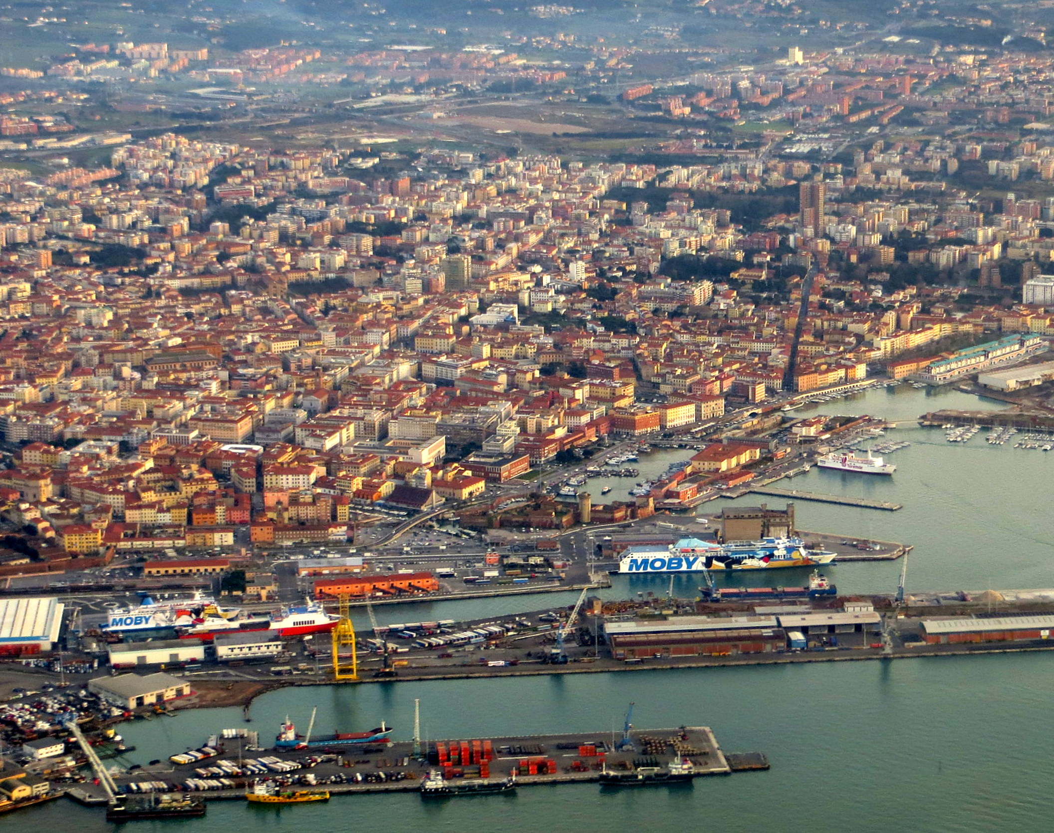 Veduta aerea del centro di Livorno